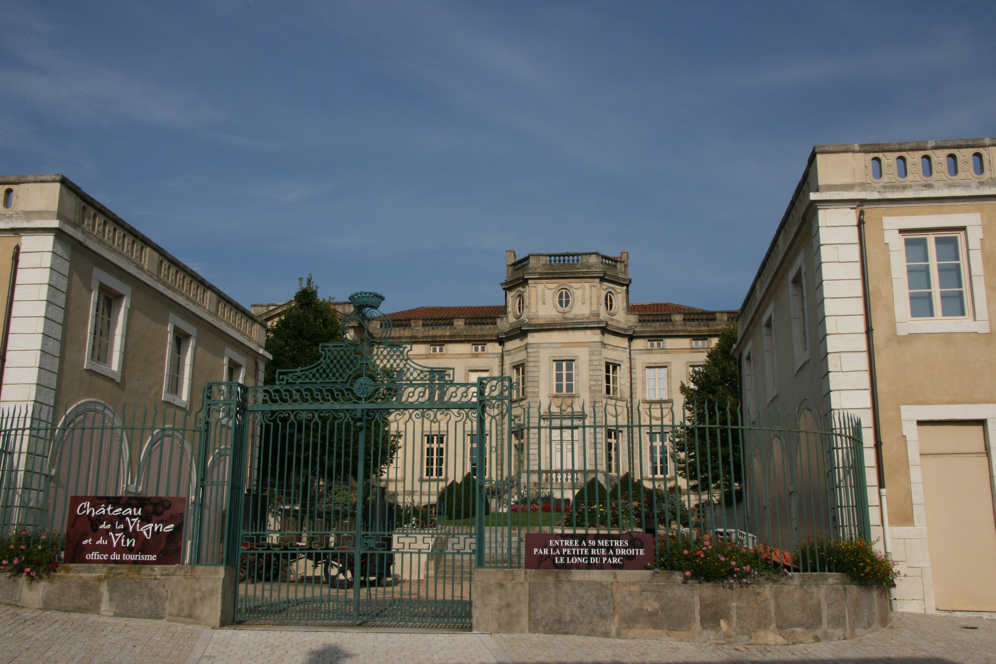 Château de Chabert. Boën (ou Boën-sur-Lignon), commune du département de La Loire, France